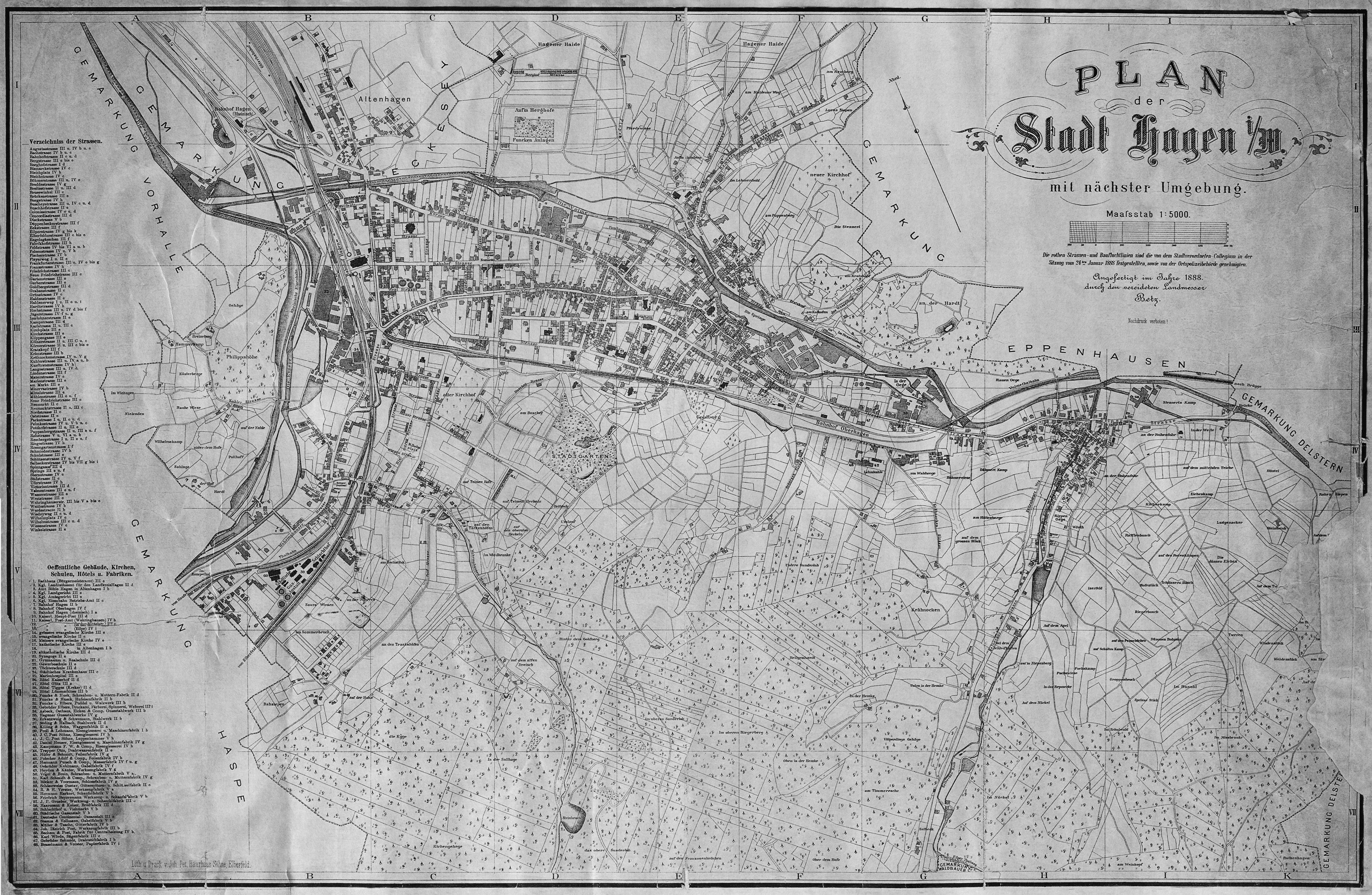 "Plan der Stadt Hagen i/W. mit nächster Umgebung. Maaßstab 1:5000. Angefertigt im Jahre 1888 durch den vereideten Landmesser Betz."